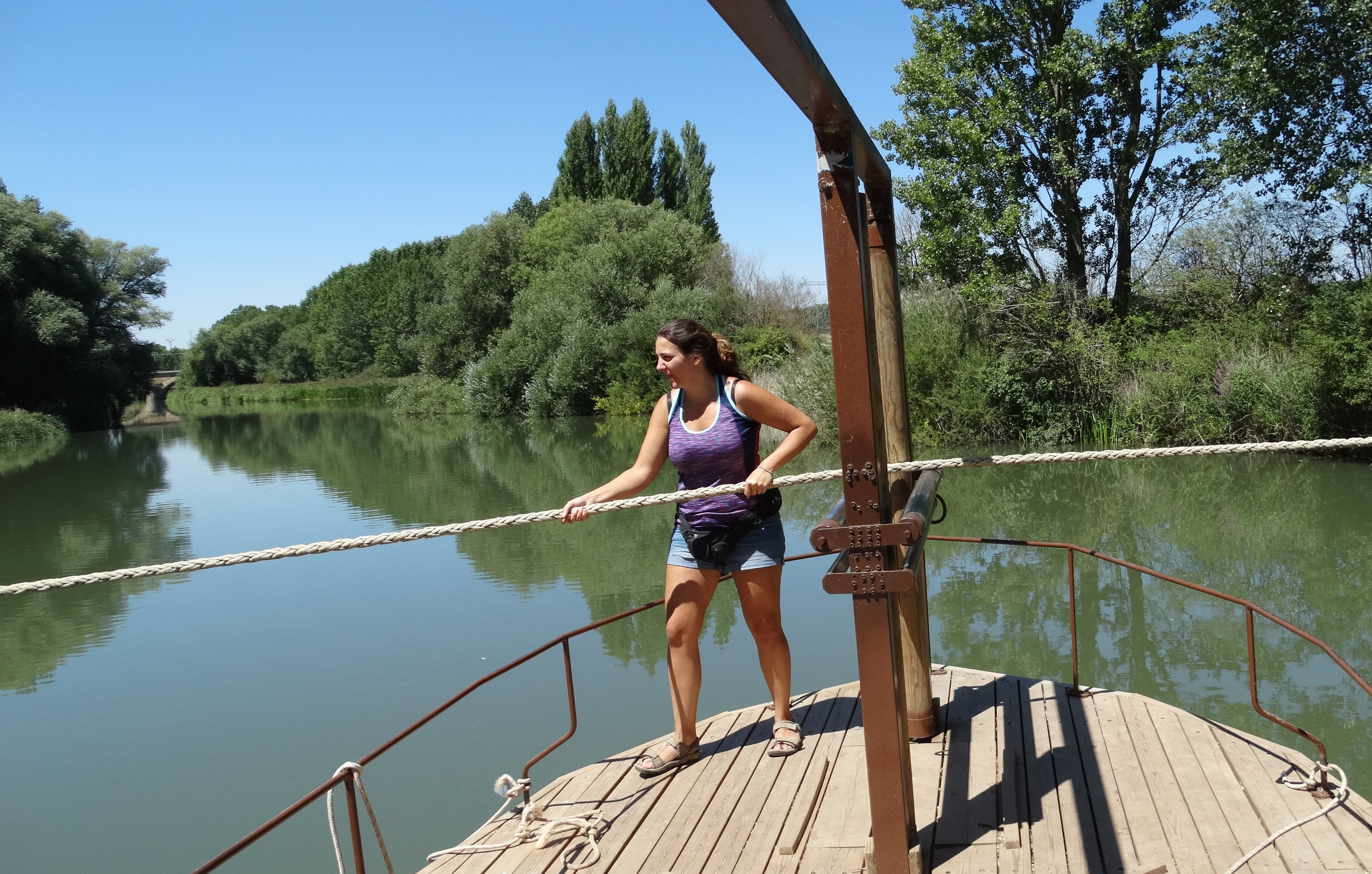 Puente Barca sobre río Pisuerga.